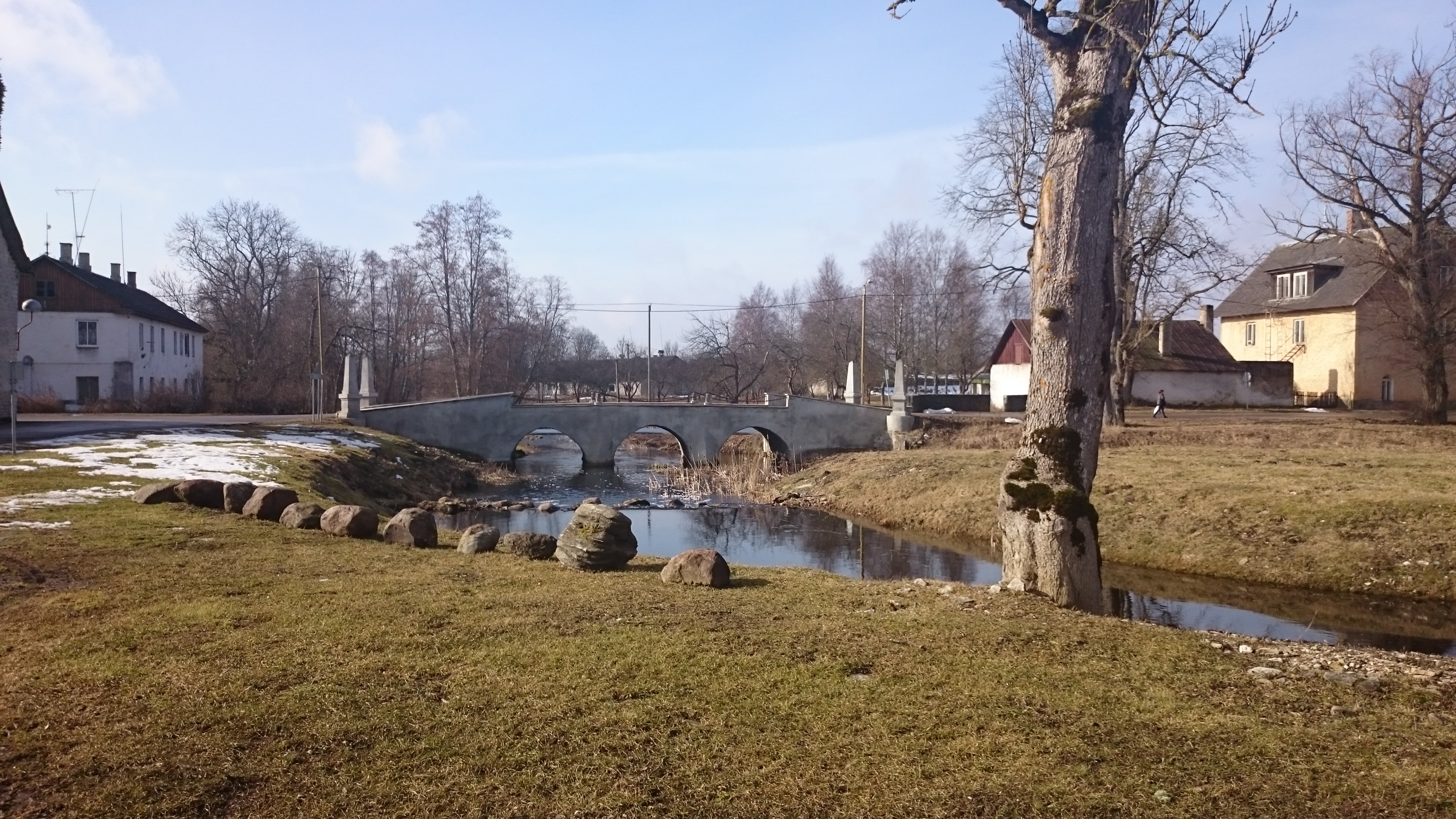 La Liivi jõgi à Koluvere